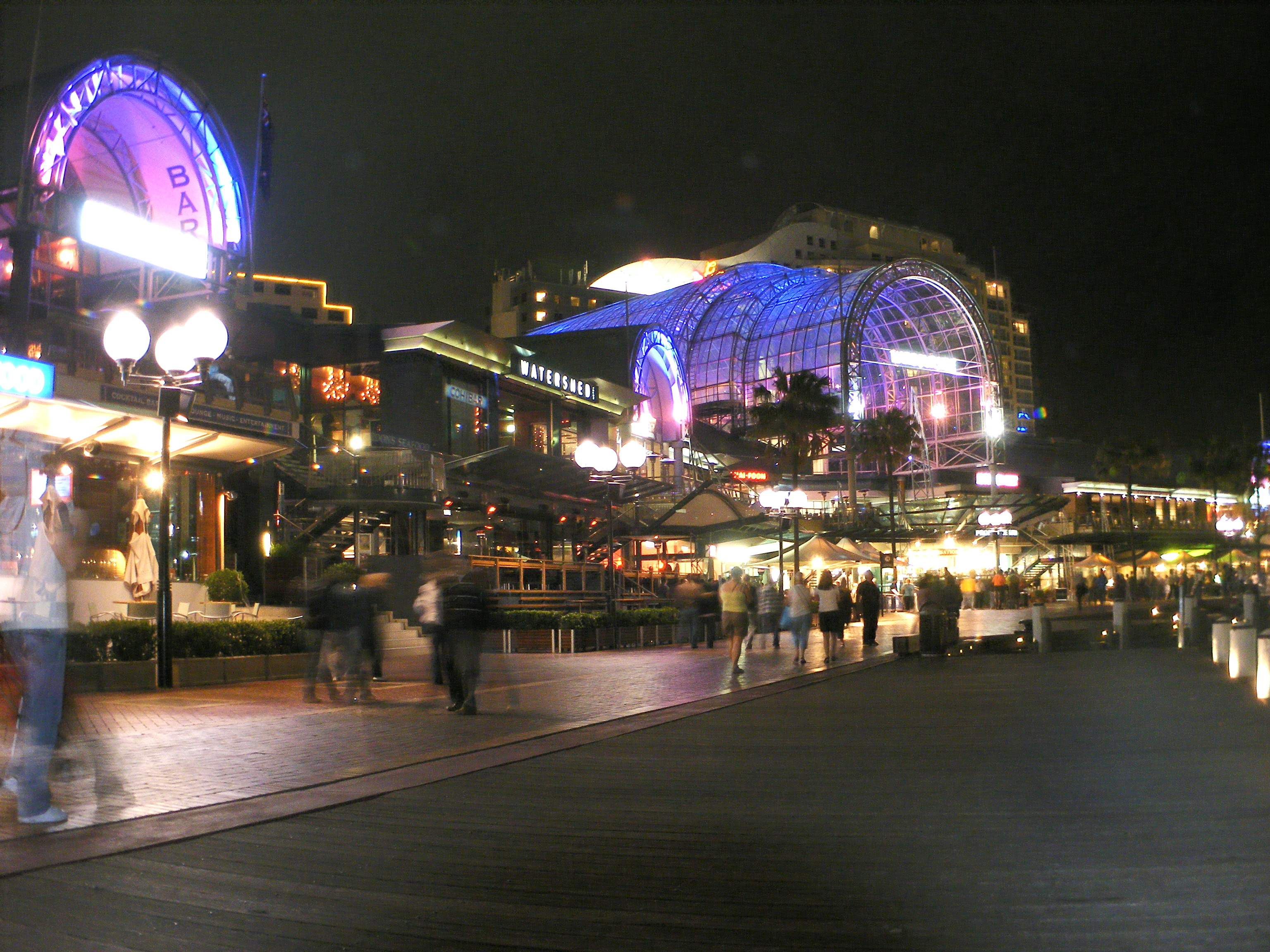 Darling Harbour, Sydney